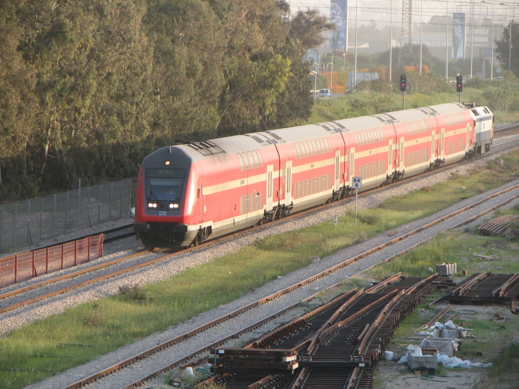 רכבת מודו דו קומתית